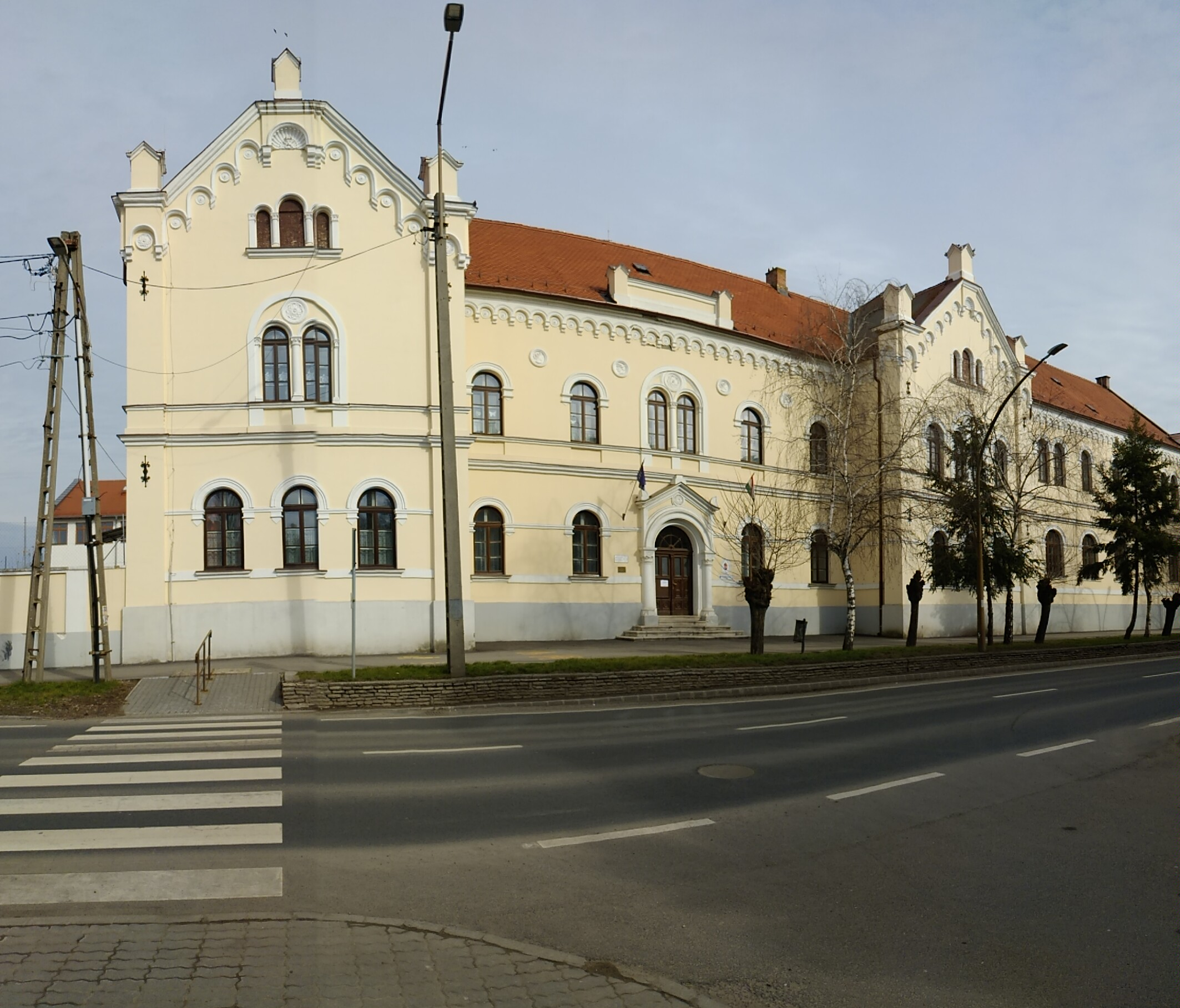 Nagyboldogasszony Kéttannyelvű Katolikus Általános Iskola 2020